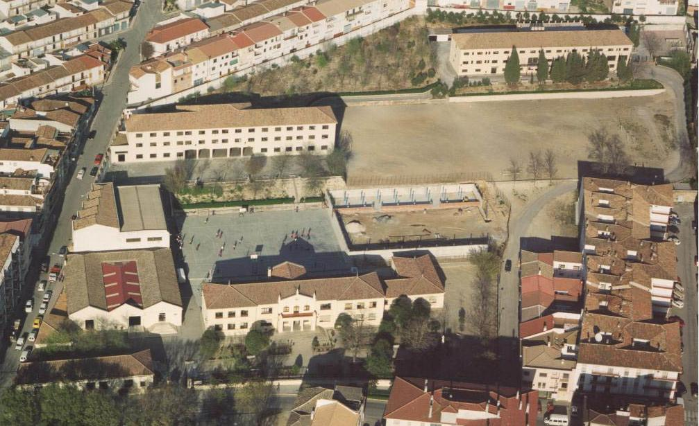 Vista Aérea, Colegio SAFA, en Alcalá la Real, Jaén, España.